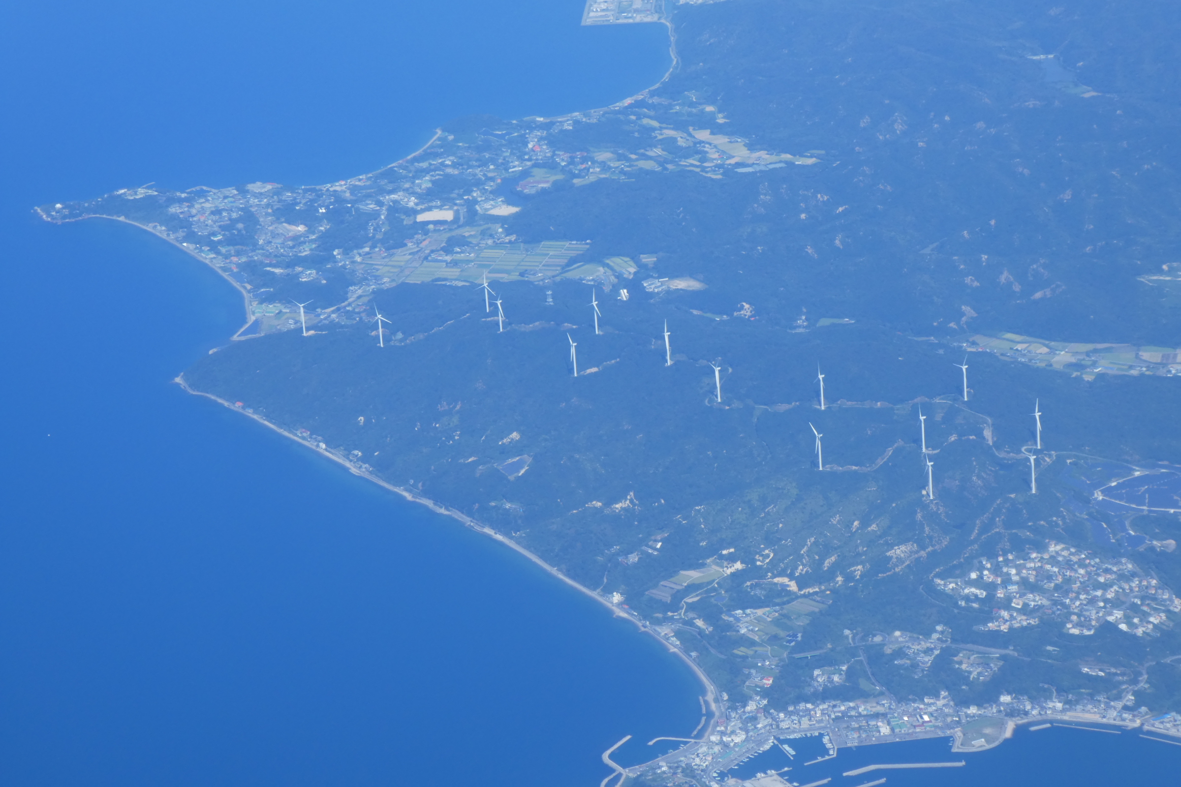 南あわじウインドファーム。上空から撮影。